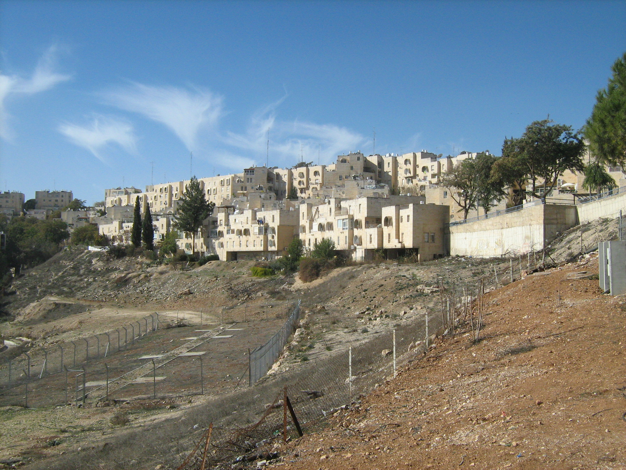 תלפיות מזרח מכיוון גם אמת המים